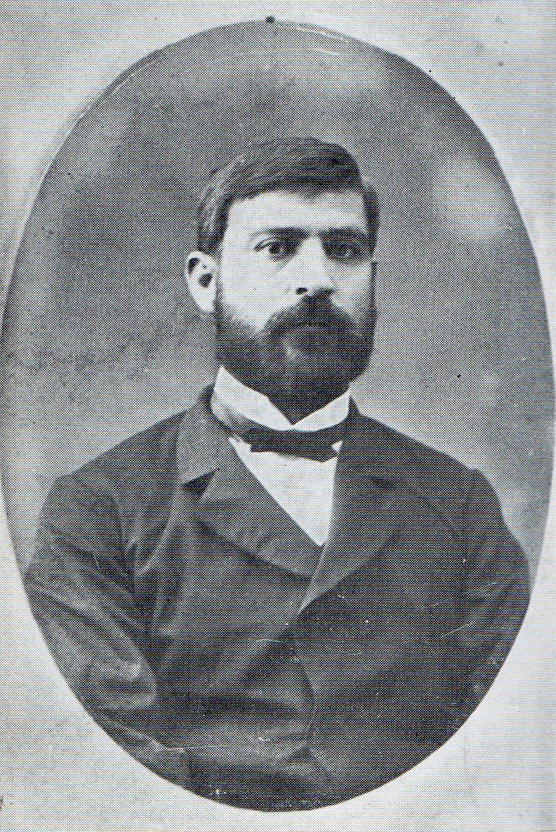 Mariano Bernad Sanz